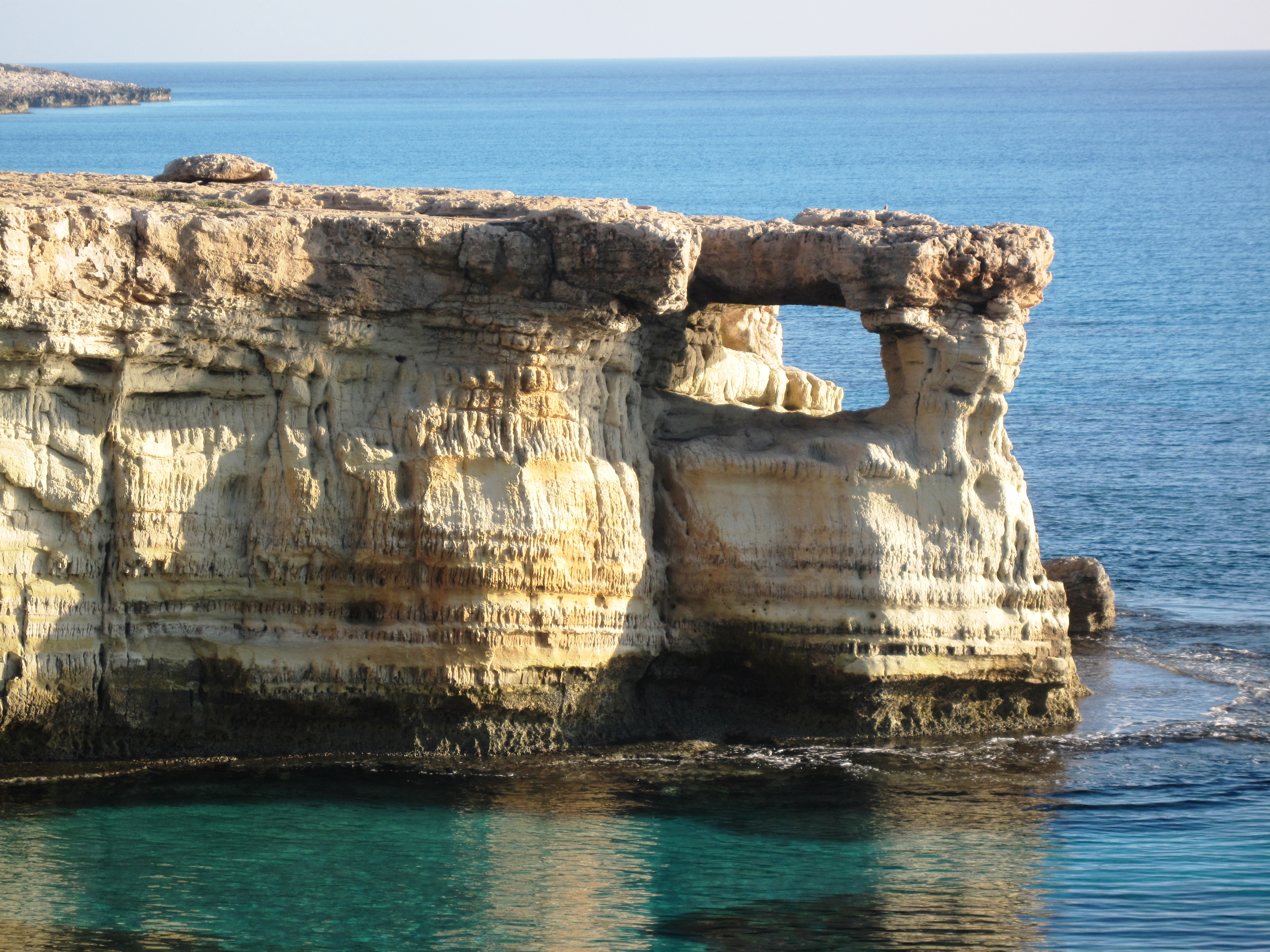 Cape Gkreko